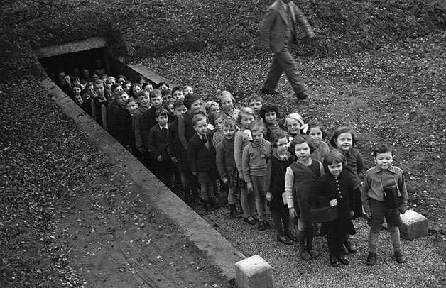 Teitl Cymraeg/Welsh title: Plant tu allan i gysgodfa rhag cyrchoedd awyr, Gresfordd Ffotograffydd/Photographer: Geoff Charles (1909-2002) Dyddiad/Date: November 10, 1939. Cyfrwng/Medium: Negydd ffilm / Film negative Cyfeiriad/Reference: (gcc00970) Rhif cofnod / Record no.: 3472118 Rhagor o wybodaeth am gasgliad Geoff Charles yn Llyfrgell Genedlaethol Cymru Ceir mwy o ffotograffau o Gymru a'r Gororau adeg yr Ail Ryfel Byd ar wefan .uk More information about the Geoff Charles Collection at the National Library of Wales More photographs of Wales and the English border during the Second World War can be found at .uk